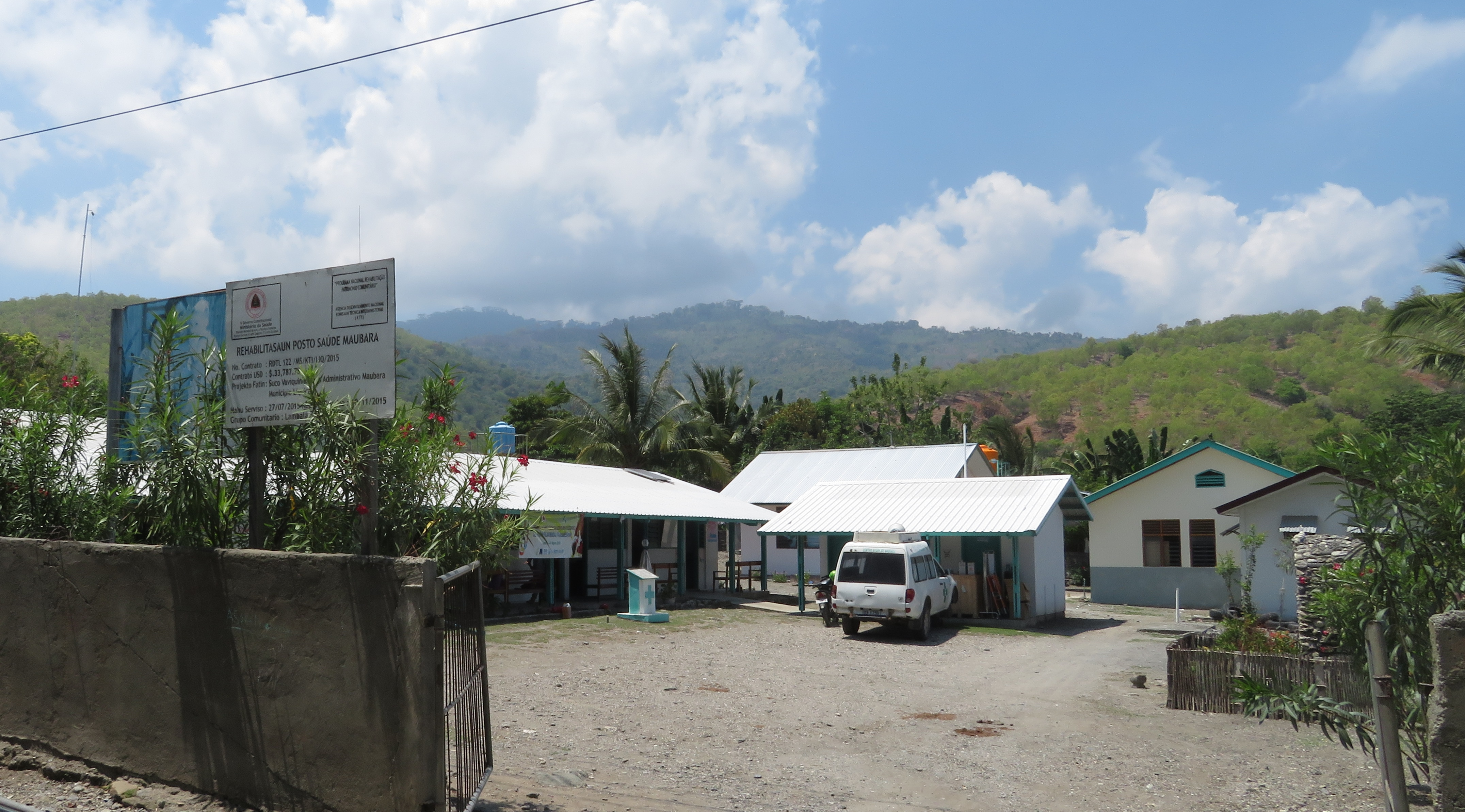 Gesundheitszentrum, Maubara, Timor Leste